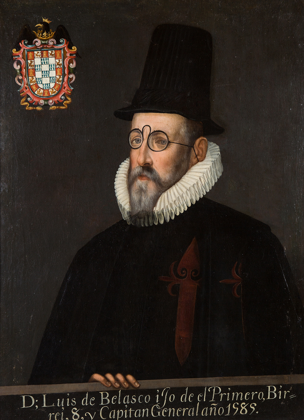 Viceroy Luis de Velasco y Castillalabel QS:Len,"Viceroy Luis de Velasco y Castilla"label QS:Les,"Virrey Luis de Velasco y Castilla"